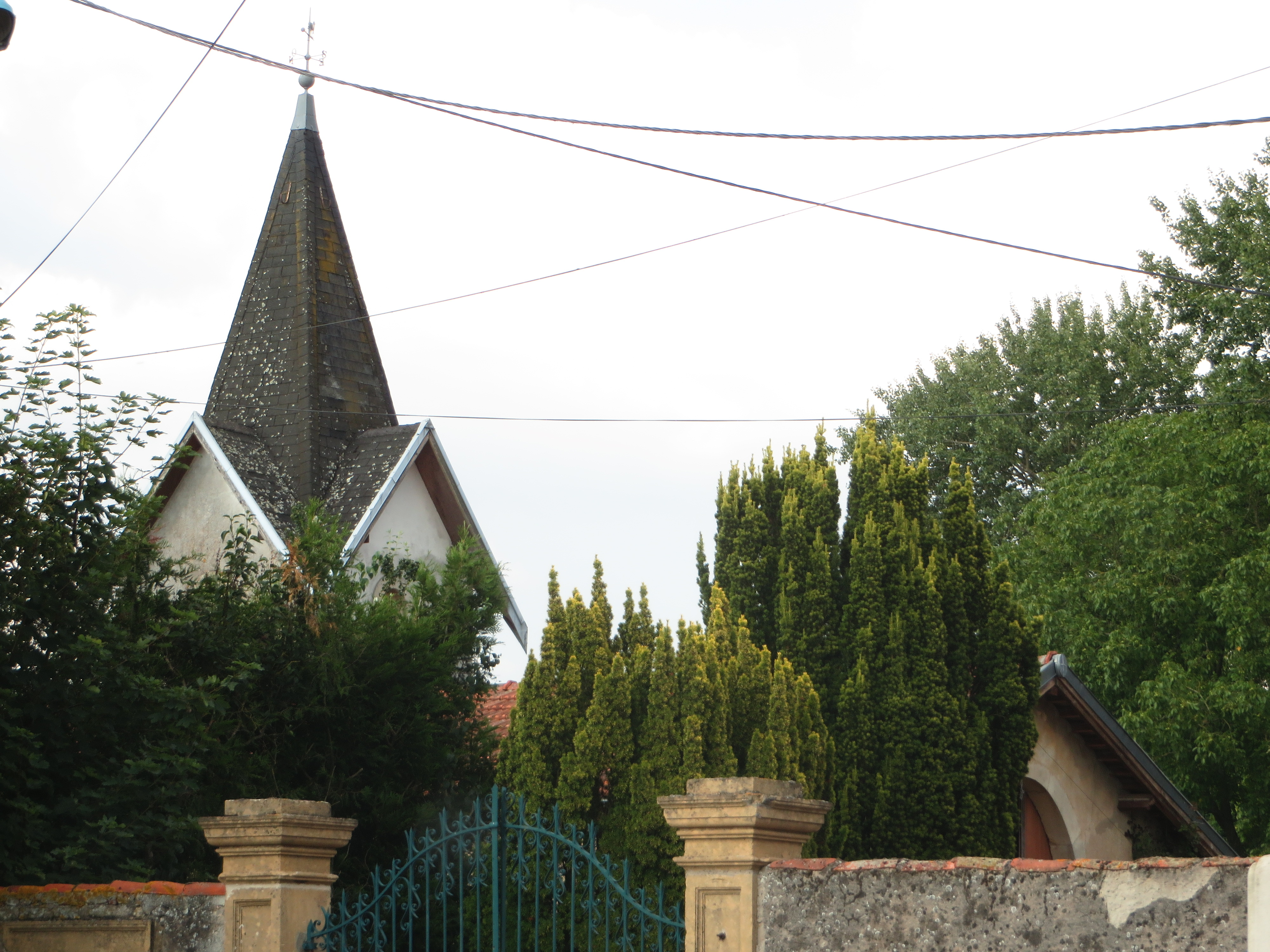 Luppy chapelle chateau